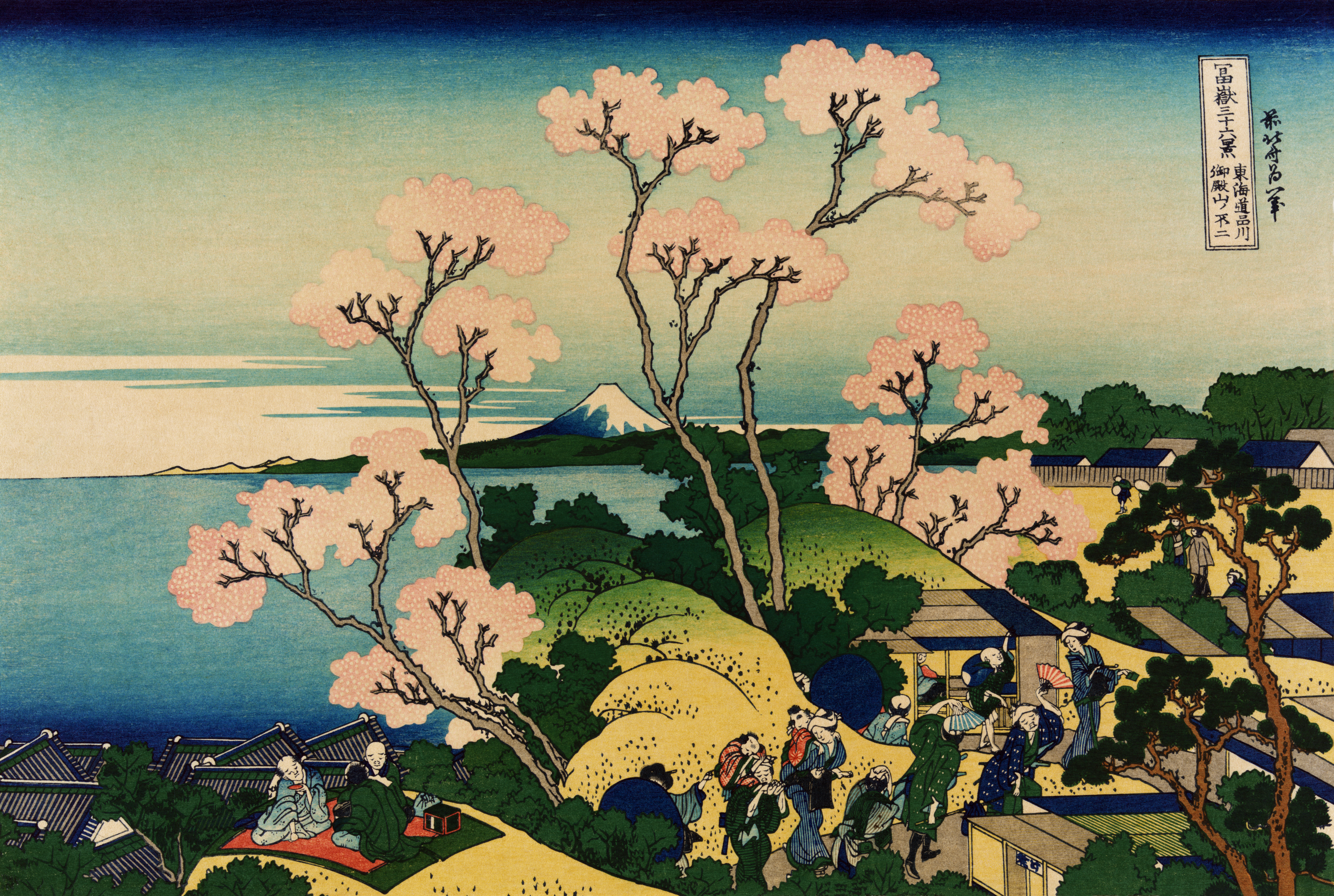 東海道品川御殿山の不二 (Tōkaidō Shinagawa Goten'yama no Fuji, Goten-yama hill, Shinagawa on the Tōkaidō)